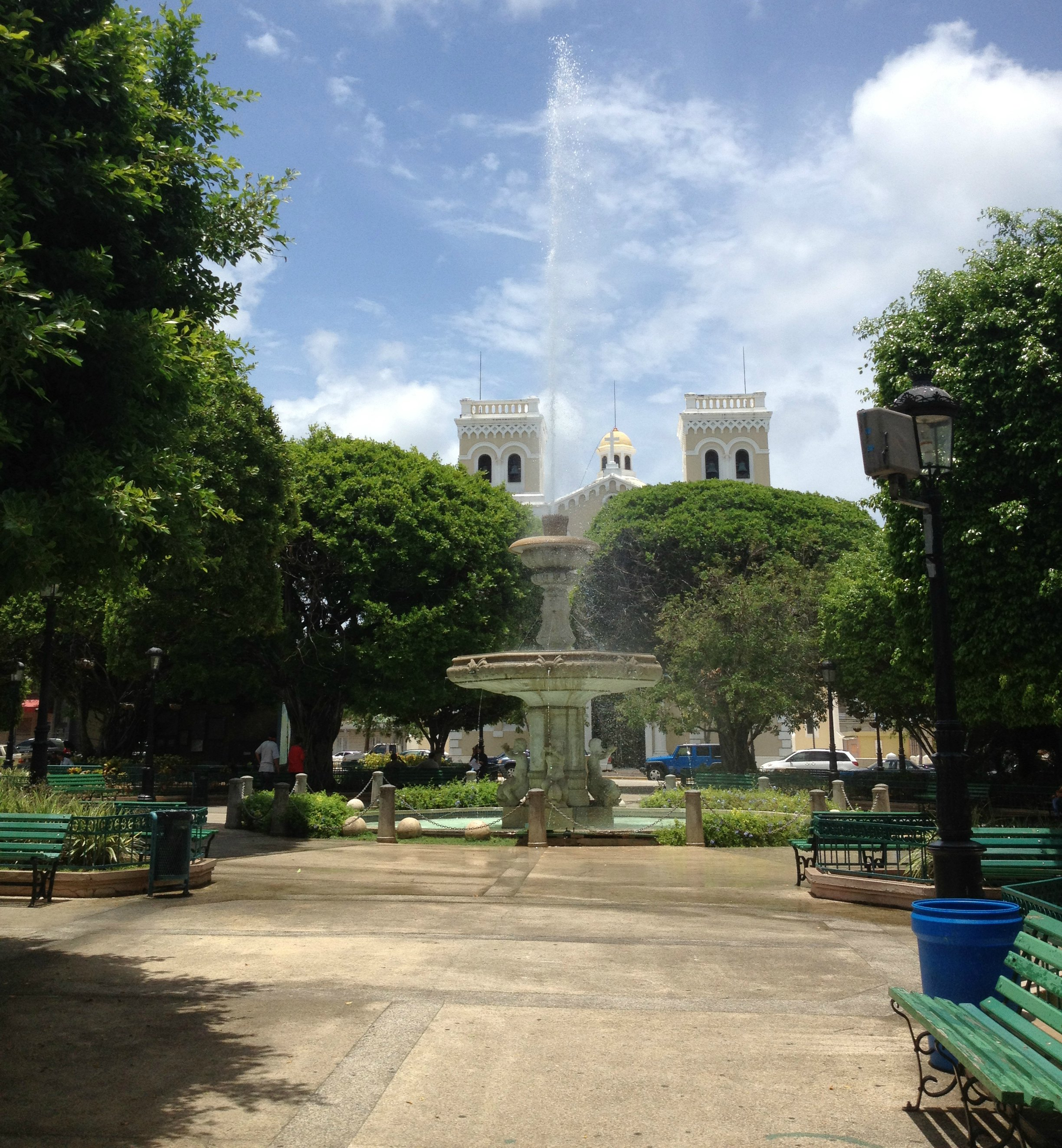 Una de las plazas MÁS Hermosas de Puerto Rico. En Su Centro La adorna una bella fuente Que FUE traída de Francia. This FUE Donada en el 1918 'entonces' Por El alcalde de Guayama, don Genaro Cautiño Insúa (1914-1920). Tiéné 16 jardines Entre los cuales sí distiguen algunos Árboles Conocido Como Laureles de la India sembrados Que were apróximadamente Para El Año 1895. La plaza mantiene tres (3) Monumentos y sin (1) busto. Los Monumentos hijo: Soldados caídos en guayameses la I y II Guerra Mundial (1952), a Los Que en Corea cayeron por la Libertad y la Democracia, Soldados caídos el 4 de Ohio (1923) y el busto de Luis Palés Matos.